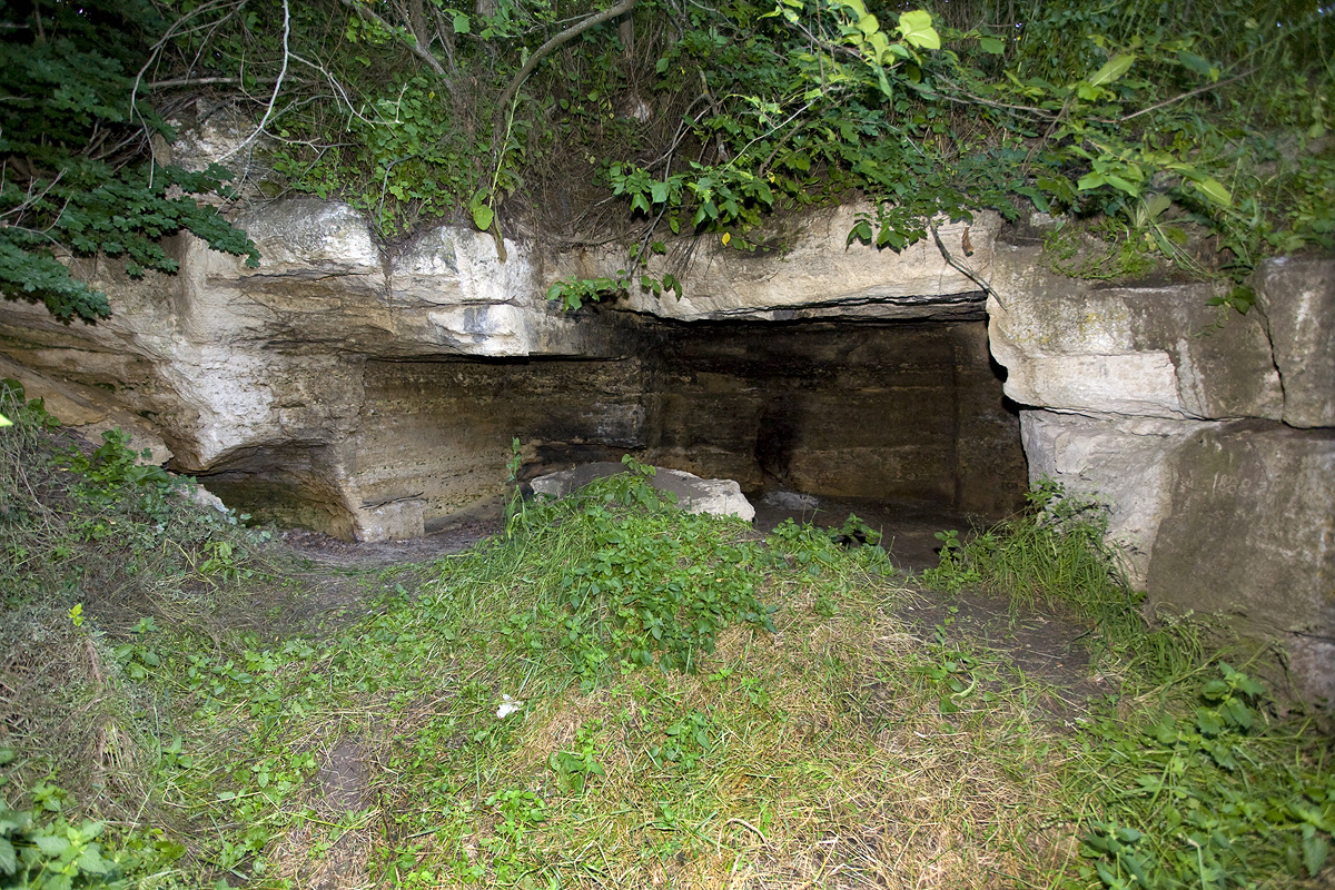 Зовнішній вигляд входу до печери Кармелюка